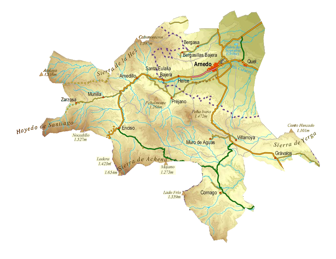 Mapa Físico Comarca Arnedo